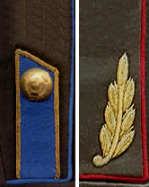 Петлица ген 1954